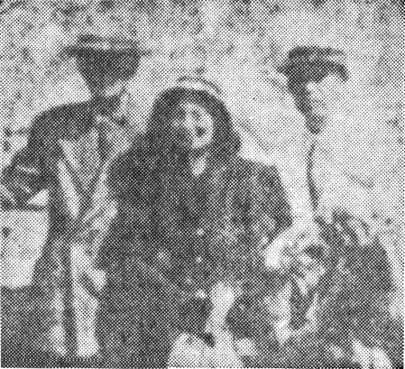 1947년 귀국 직후의 서재필, 뮤리엘 스테파니, 서호석